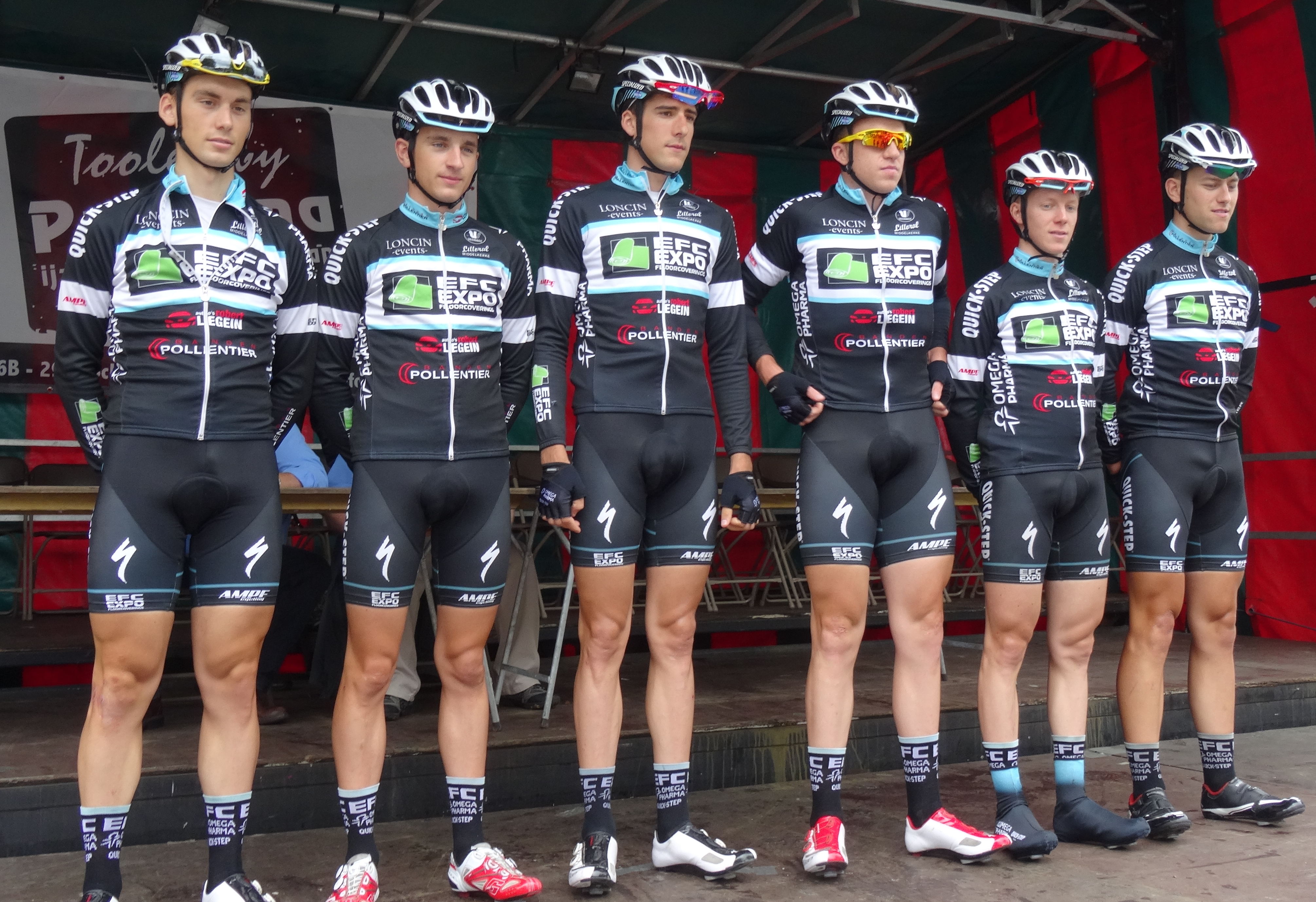 Reportage photographique réalisé le dimanche 10 août à l'occasion du départ et de l'arrivée de la Flèche du port d'Anvers 2014 à Merksem (Anvers), Belgique.